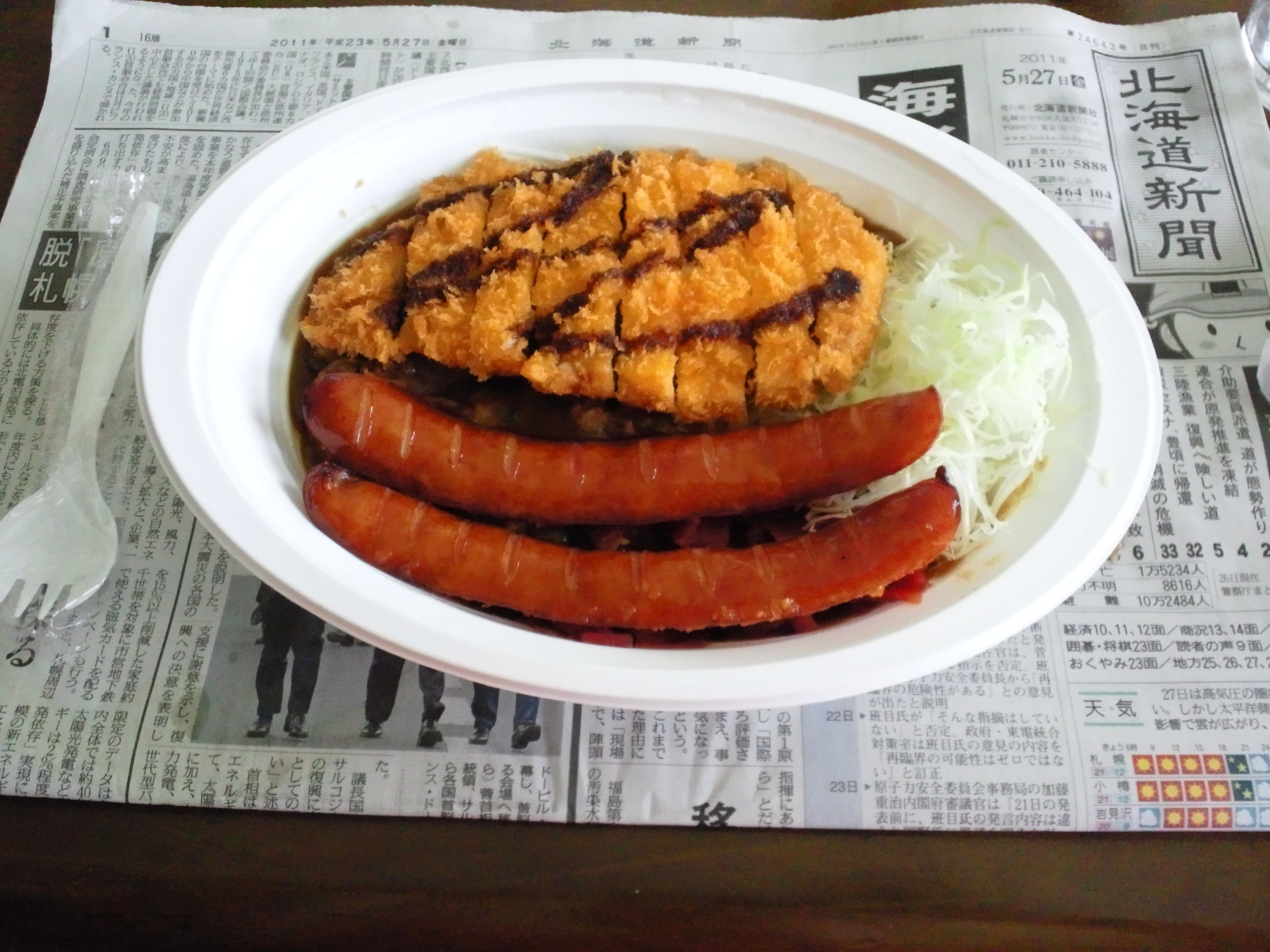 カレーのチャンピオン 白石店のテイクアウト Lカツカレーウインナートッピング